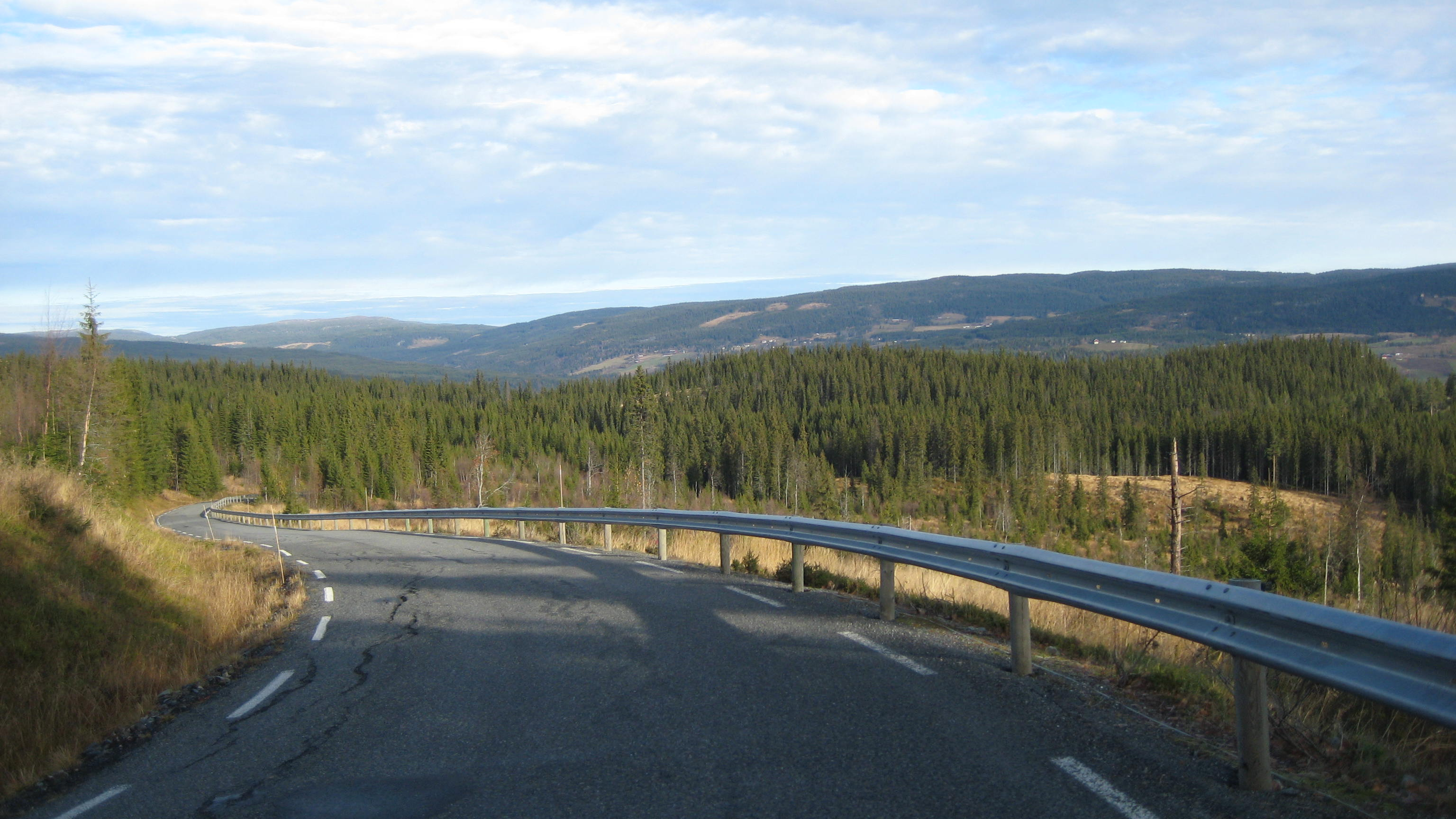 Fylkesvei 2434, tidl. 194